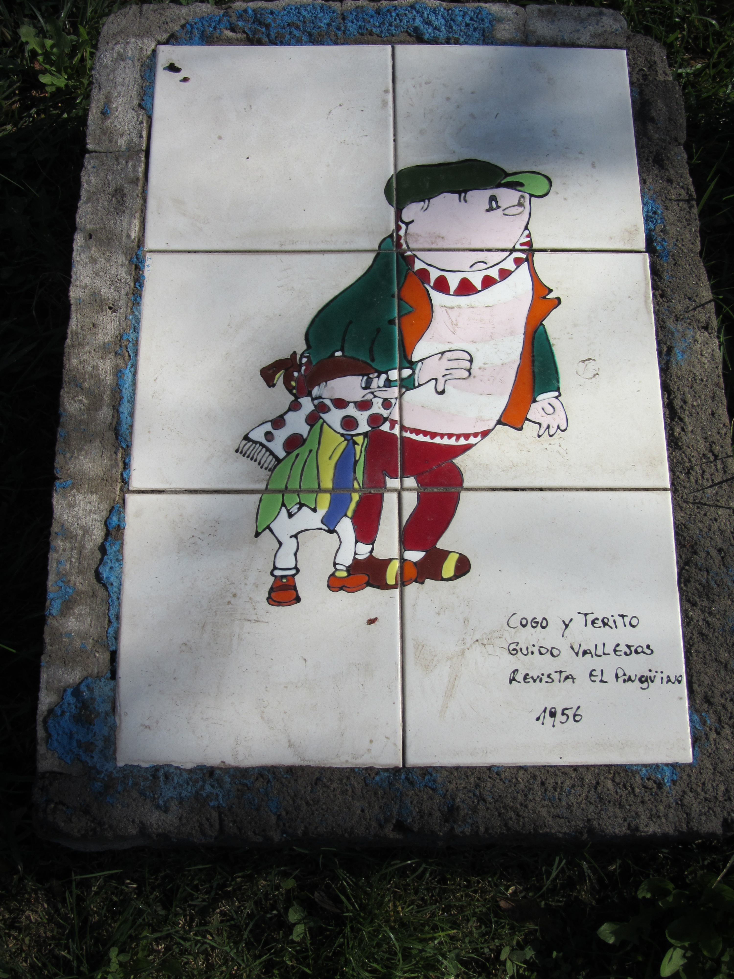 Parque del Cómic